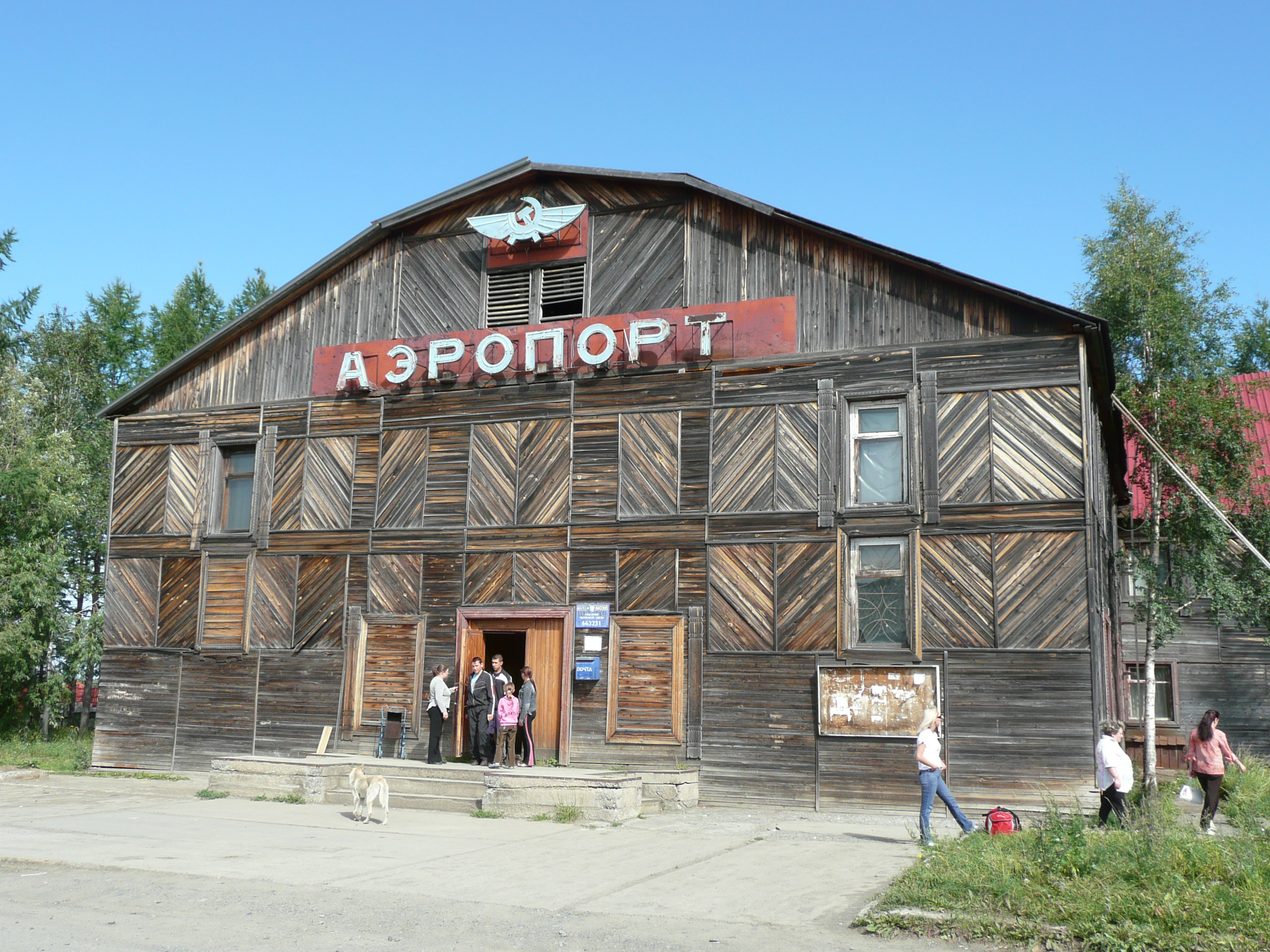 Turukhansk airport.